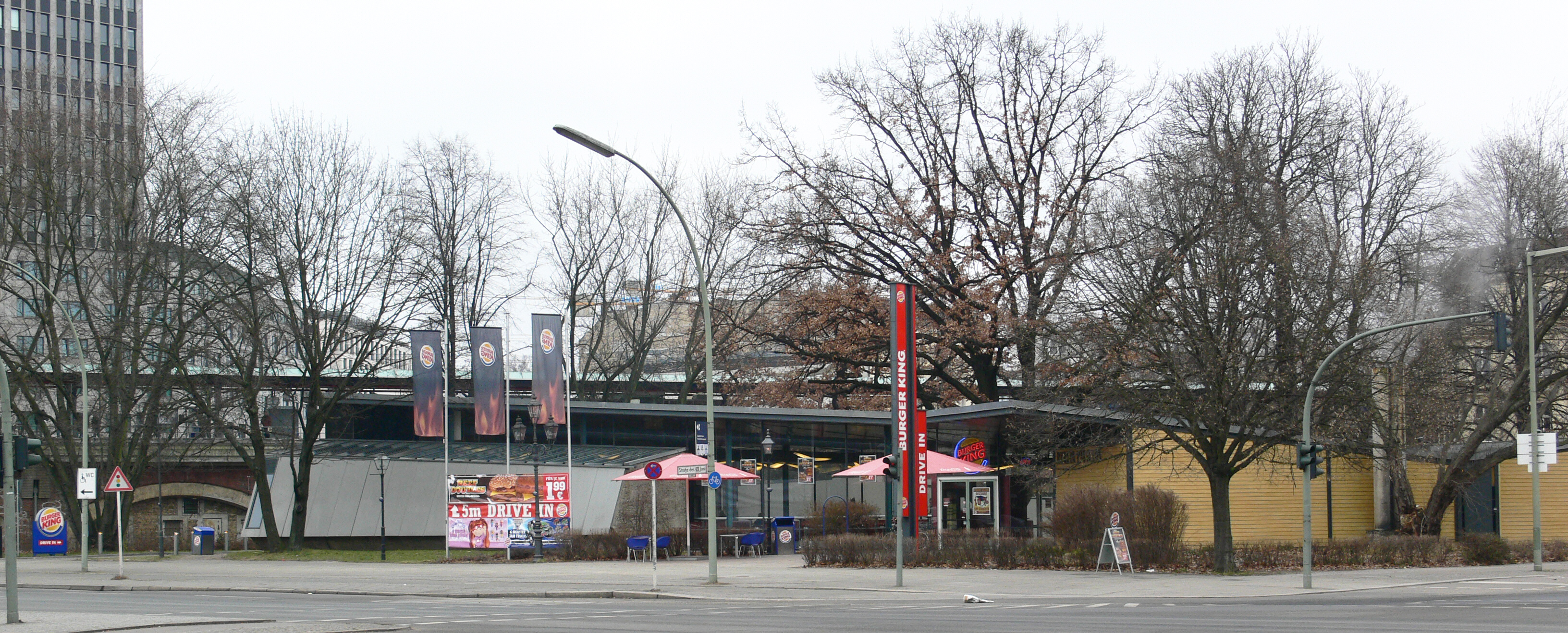 Berlin-Pavillon (Hansaviertel)